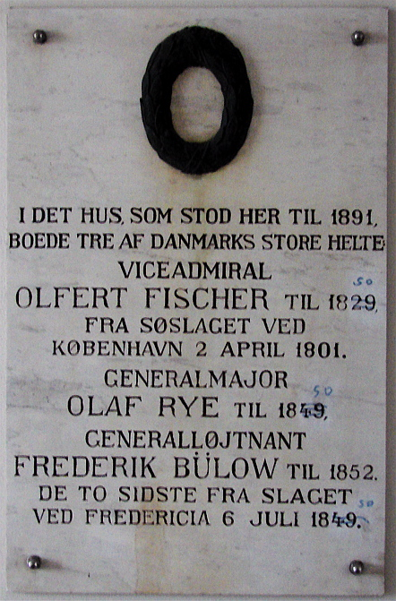 Mindeplade i Sankt Annæ Passage over Olfert Fischer, Olaf Rye og Frederik Bülow, København